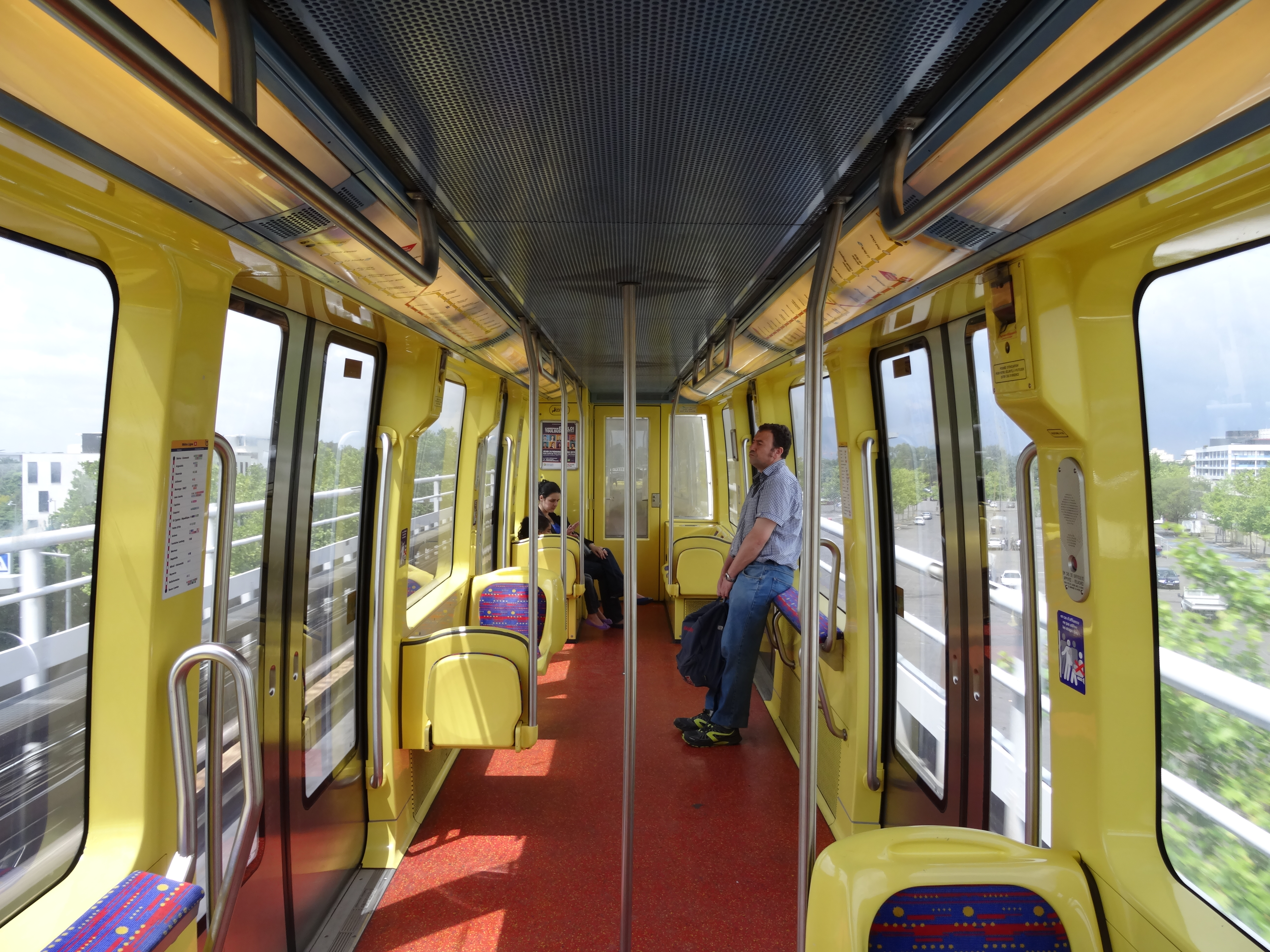 Ligne A